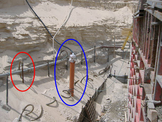 קריית ים